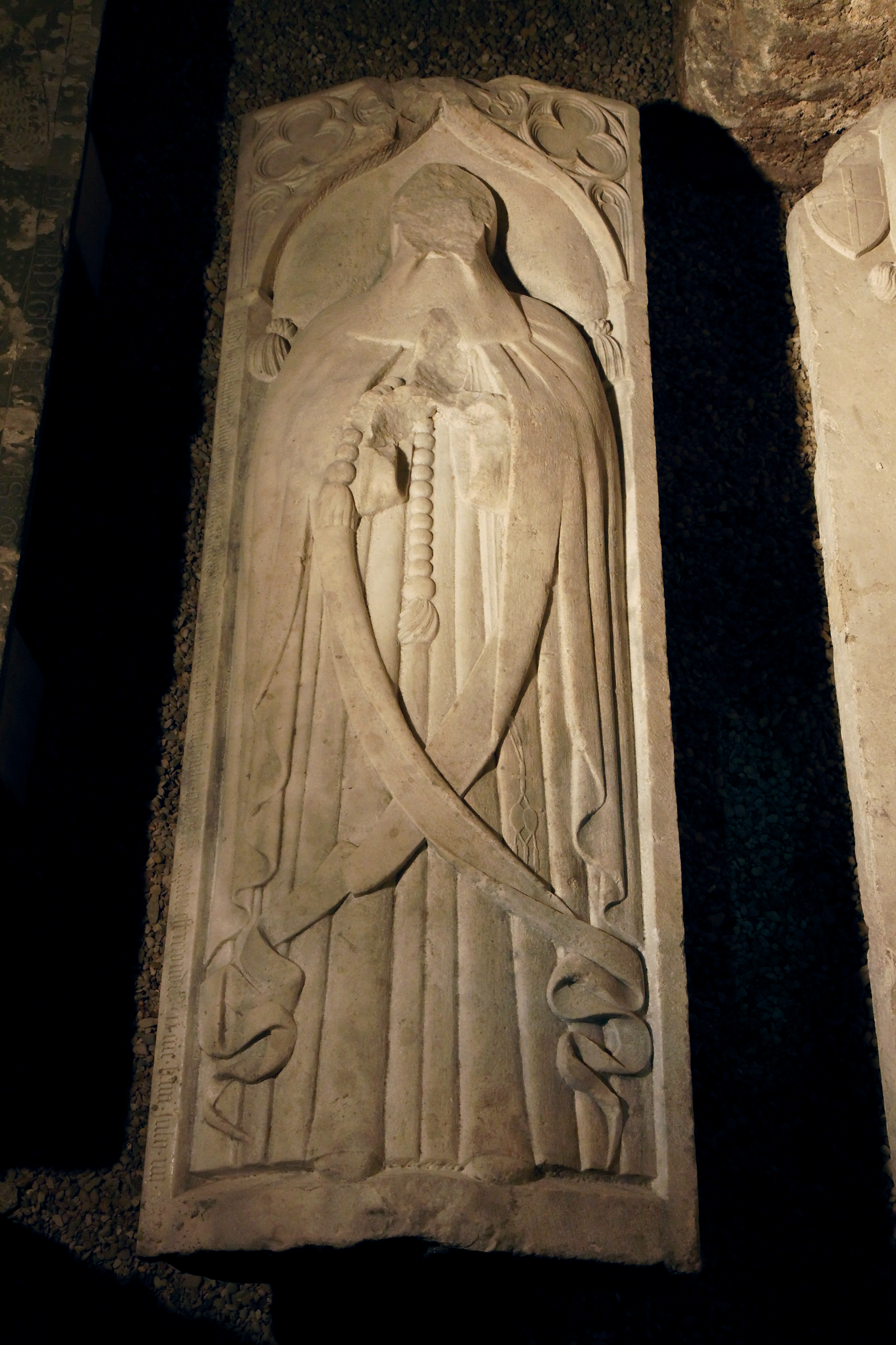 Dalle funéraire en marbre de Jacques de Milly qui était le 35ème grand maître de l'ordre des Hospitaliers de Saint-Jean-de-Jérusalem. Dans le même tombeau fut également inhummé Jean de Savoie, Prince d'Antioche, mort à l'âge de quatre ans. Provenance : Eglise Saint Jean de Rhodes Classement : 18846